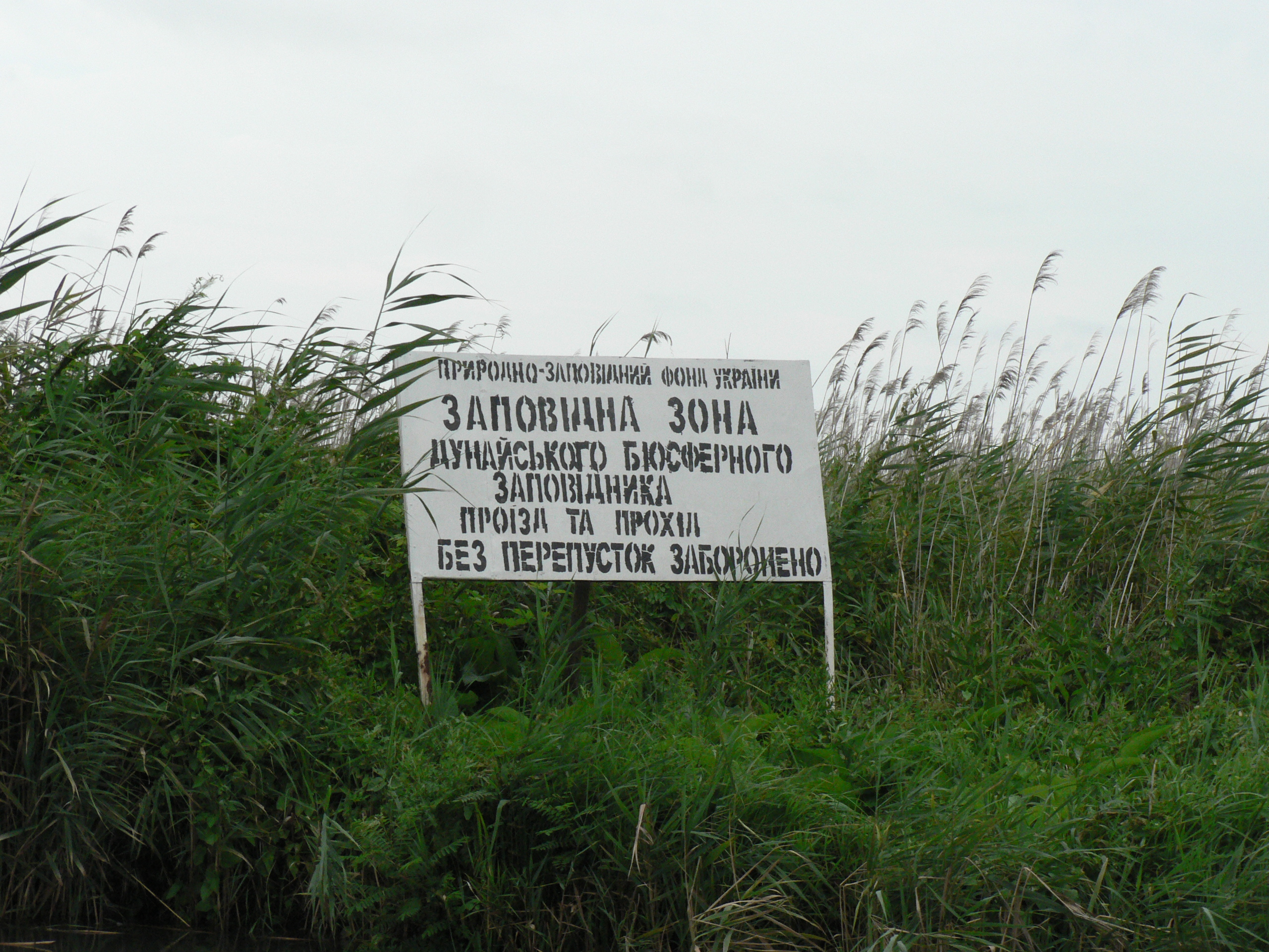 Табличка заповіднику. Кілійський р-н, м. Вилкове